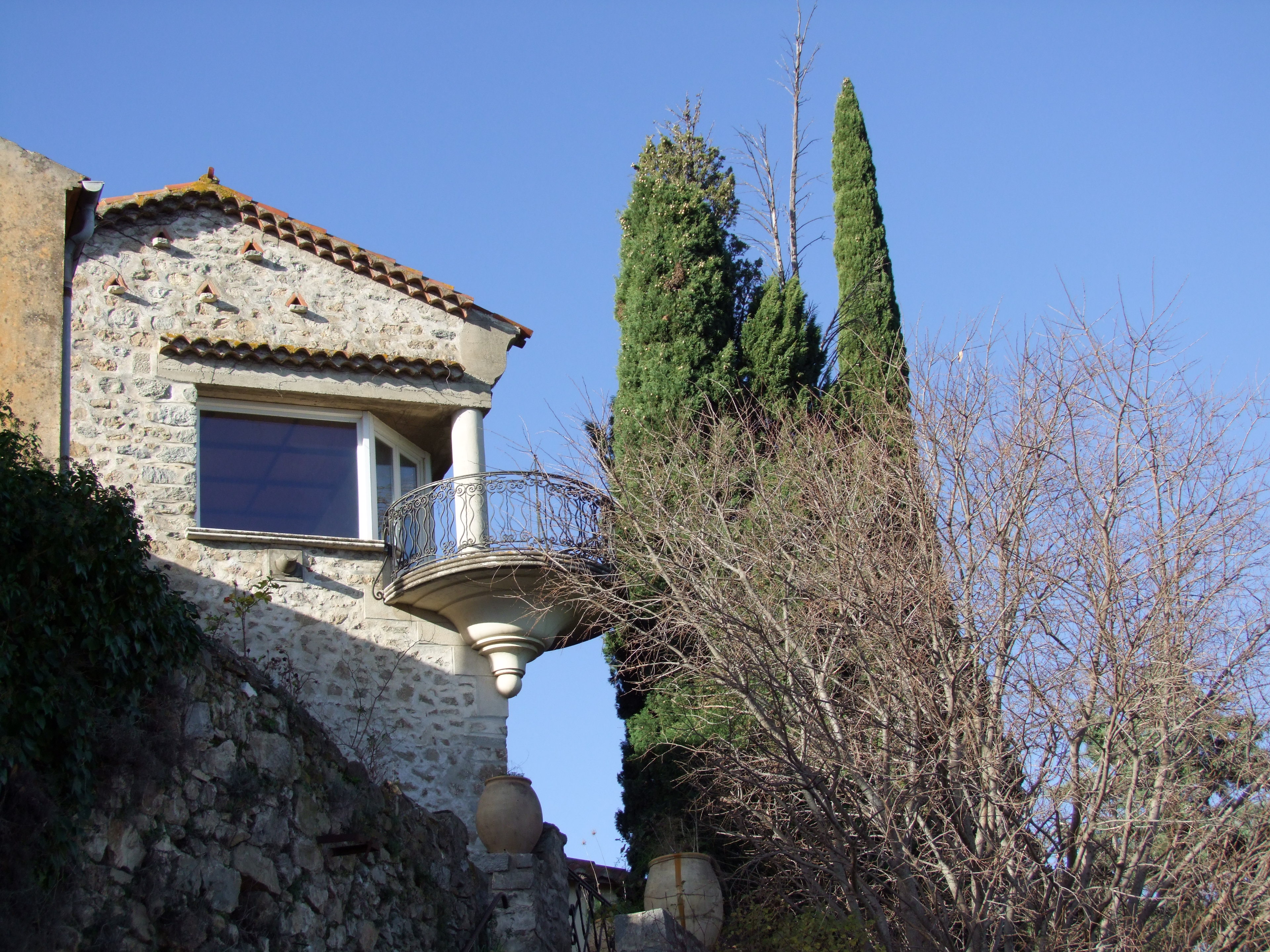 Cet angle nord-est de ce qui reste des anciens bâtiments conventuels,présente un condensé typique de l'architecture Art Déco mise en œuvre par Alfred Joffre,ancien propriétaire du site entre 1935 et 1950,et architecte urbaniste délégué aux Monuments Historiques durant cette période.